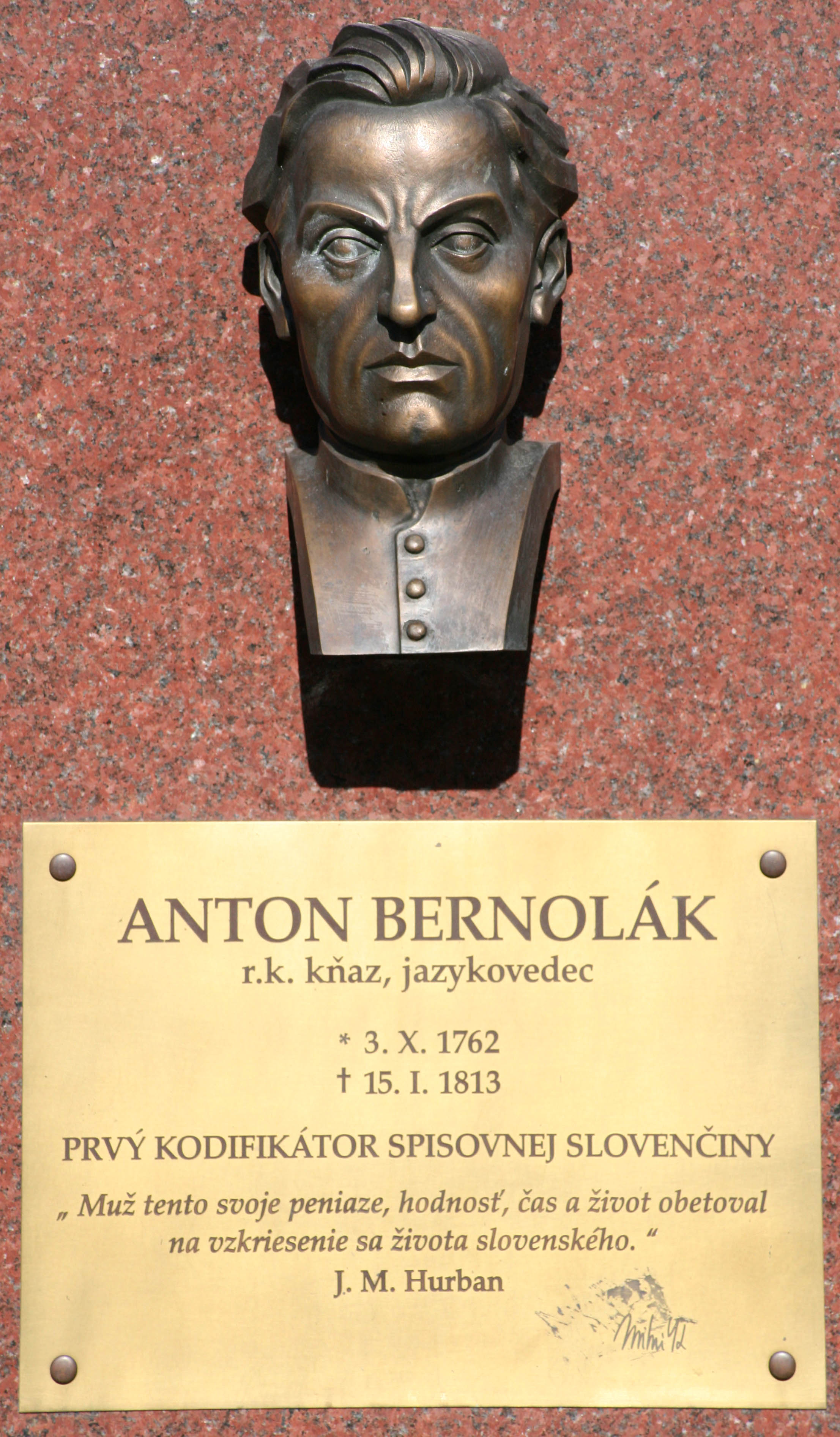 Busta s informačnou tabuľou v bratislavskej Petržalke na Daliborovom námestí